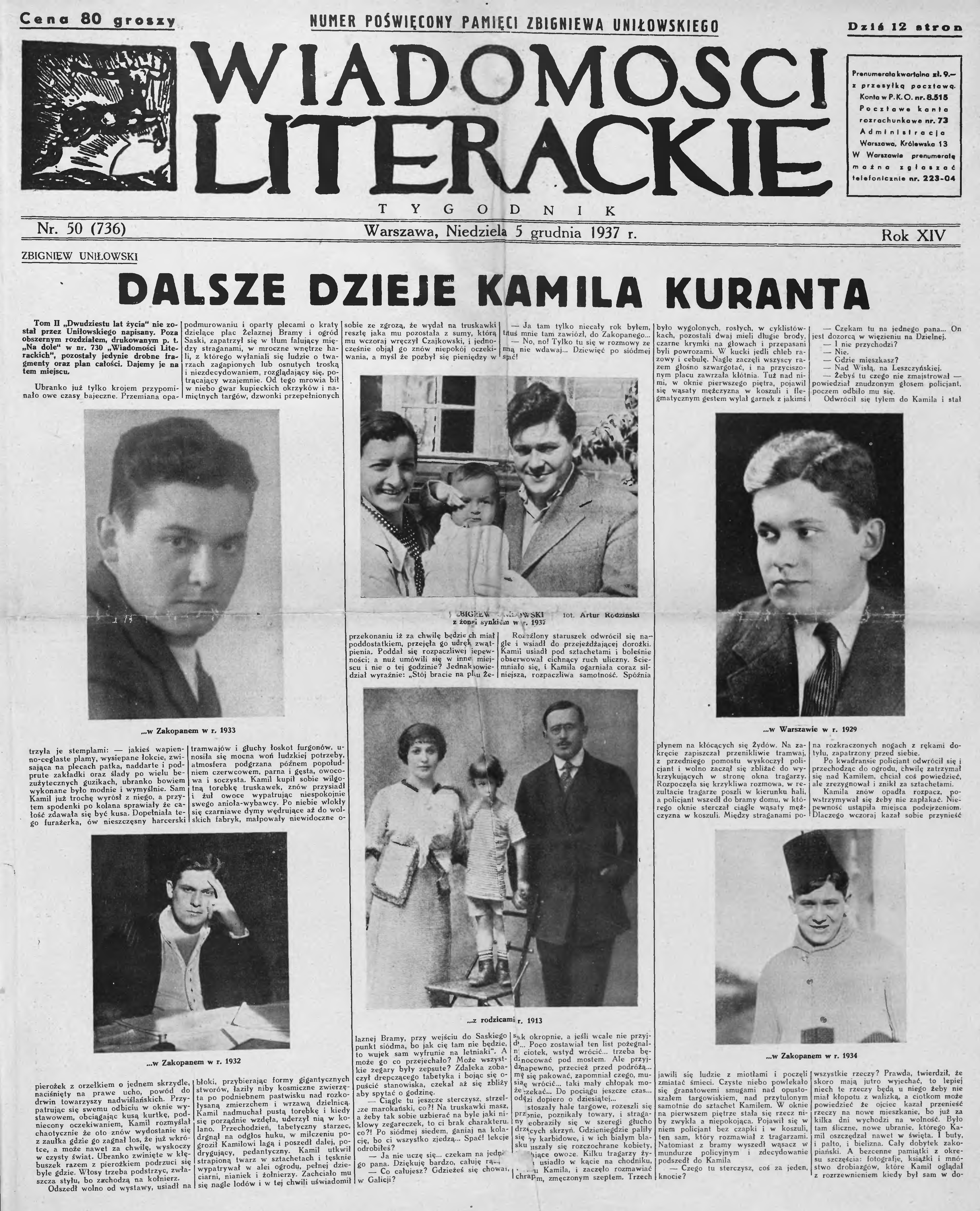 skan czasopisma PL, Wiadomości Literackie 5 XII 1937 nr 50 (736)Numer specjalny poświęcony Zbigniewowi Uniłowskiemu